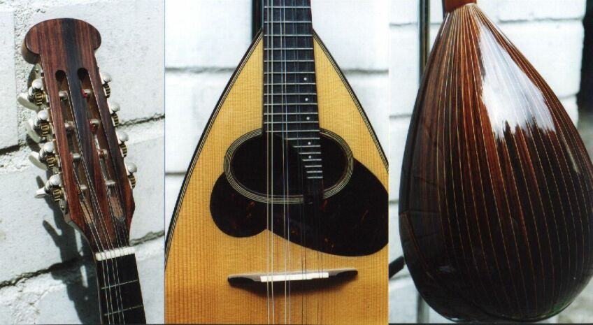 Summary Mandoline. klassisches Modell M-20 der japanischen Firma Torella (1980). Bildbeschreibung: Details: Kopf, Schalloch und Decke, Rundbauch... Quelle: eigens Foto... Fotograf/Zeichner: bodoklecksel 09:21, 1. Apr 2006 (CEST) Datum: ... Sonstiges: ... eigenes Foto